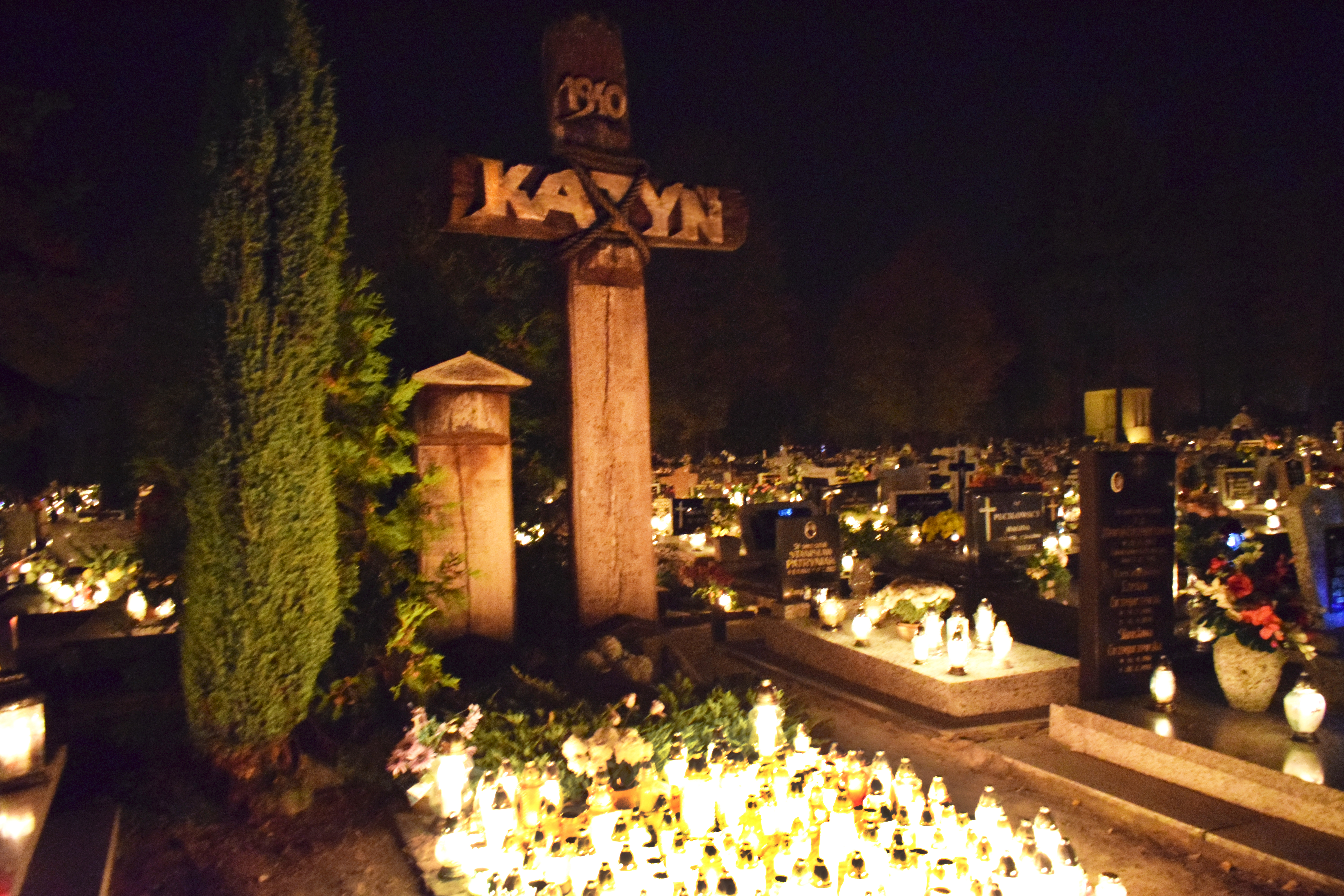 Krzyż Katyński w Krotoszynie nocą.